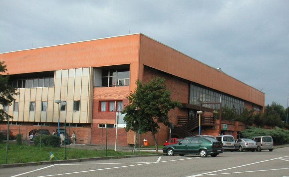 Pohled na Zimní stadion Benešov